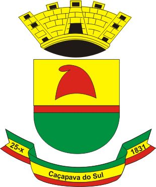 Coat of arms of Caçapava do Sul, Rio Grande do Sul, Brazil.